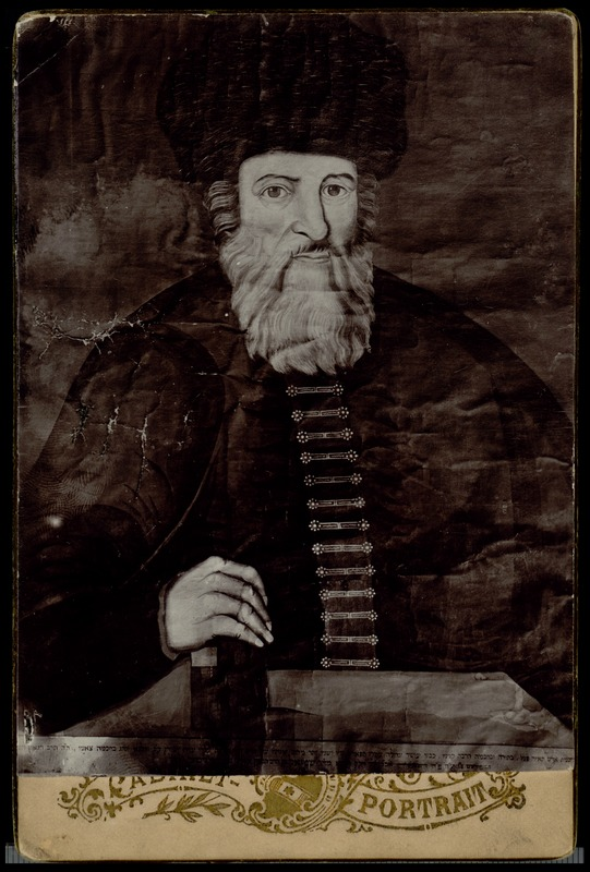 תצלום רפרודוקציה מהדפס ובו ציור דיוקנו של הרב שמואל בן אביגדור: הדפס שחור לבן בתבנית Cabinet card, בגודל 10.5X16 ס"מ. רפרודוקציה זו הופקה ברוסיה, בשלהי המאה התשע עשרה, והיא נתרמה לבית הספרים הלאומי על ידי ד"ר יוסף חזנוביץ', ביאליסטוק.